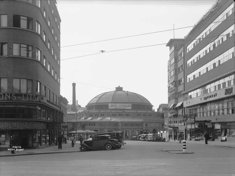 Gateløp, Hotel Continental, Cirkusbygningen, Cirkus Schumann, Saga kino, biler, mennesker.